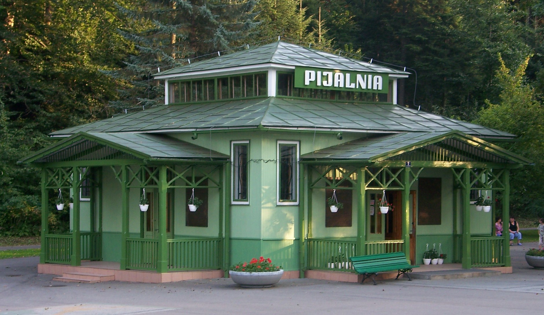 Pijalnia wód w Rymanowie Zdroju